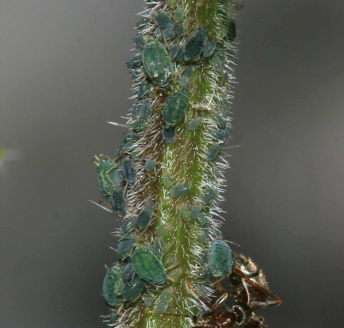 Ref